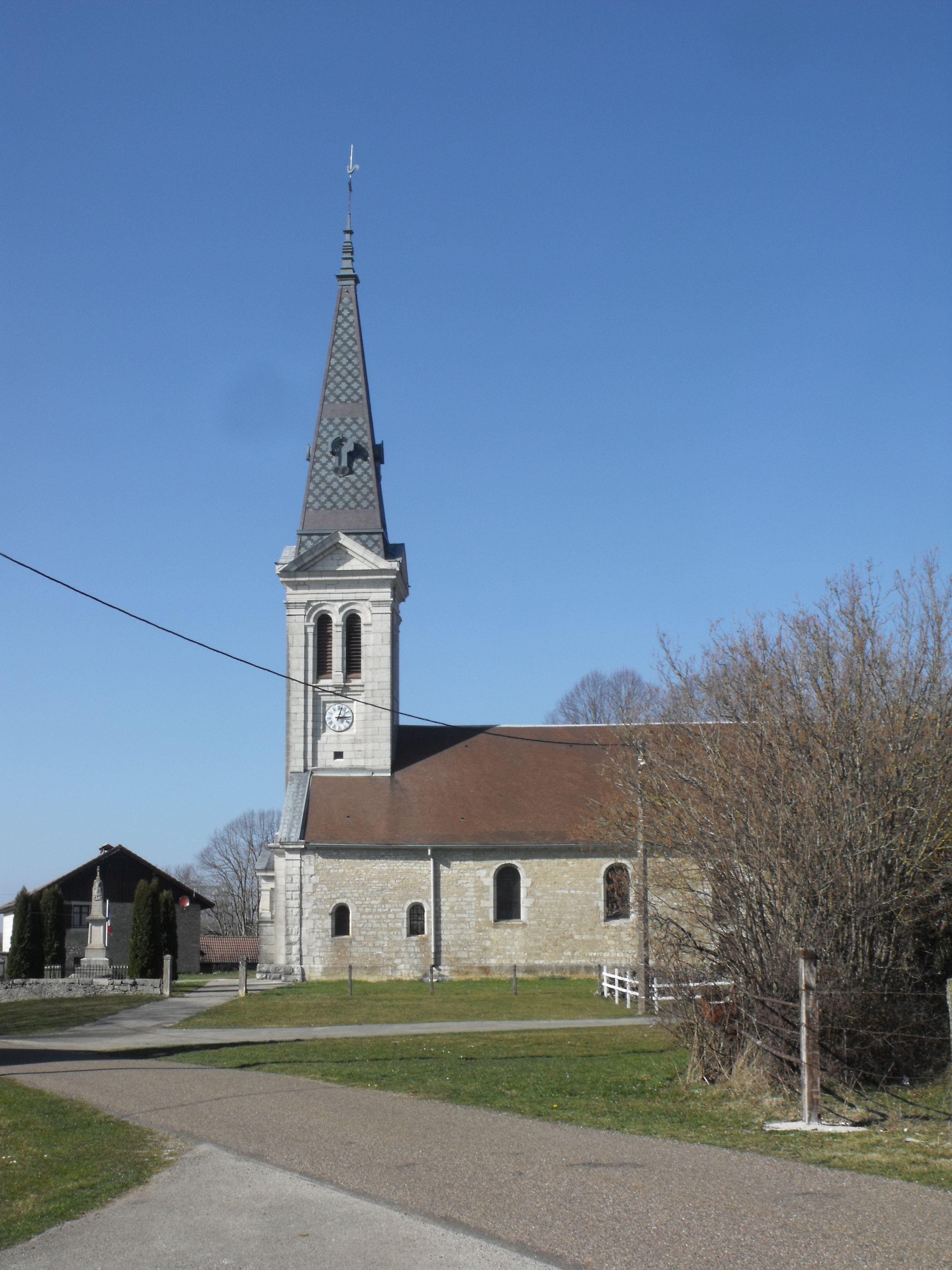 Eglise de Villers-la-Combe, Doubs, France